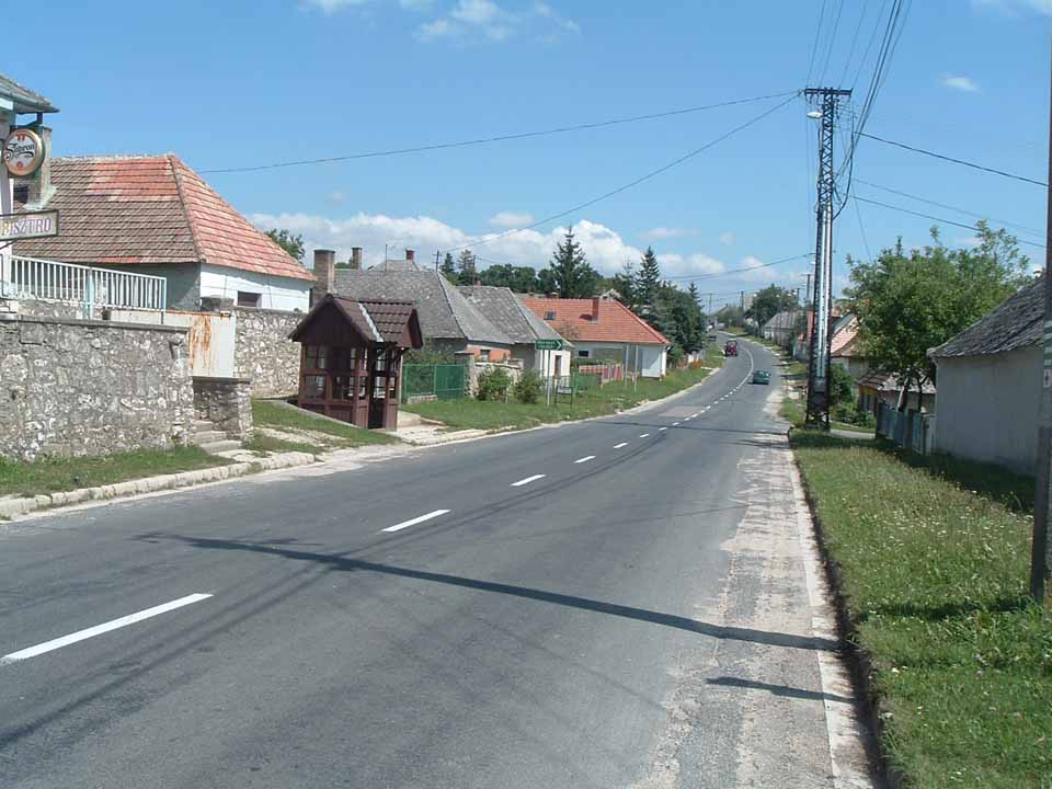 Pénzesgyőr, Hungary